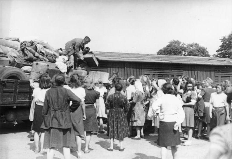 ADN-ZB/Donath Deutschland: Deutsche Umsiedlerinnen aus der Sowjetunion und Jugoslawien bei ihrer Ankunft im Durchgangslager Gronenfelde. Aufn. 1948